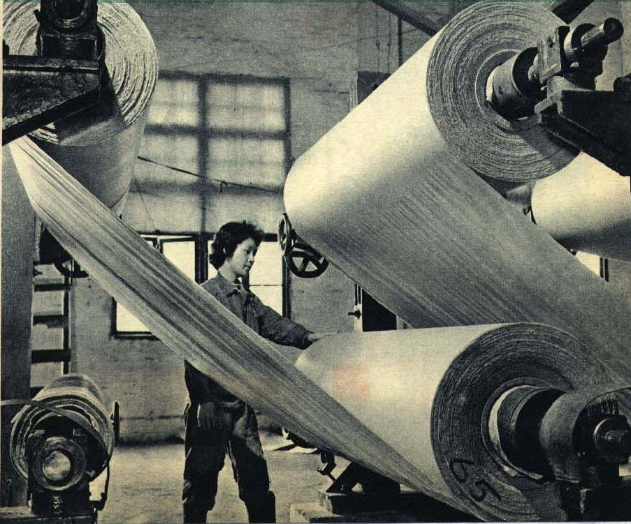 1962-07 1962年 甘蔗渣为原料造纸